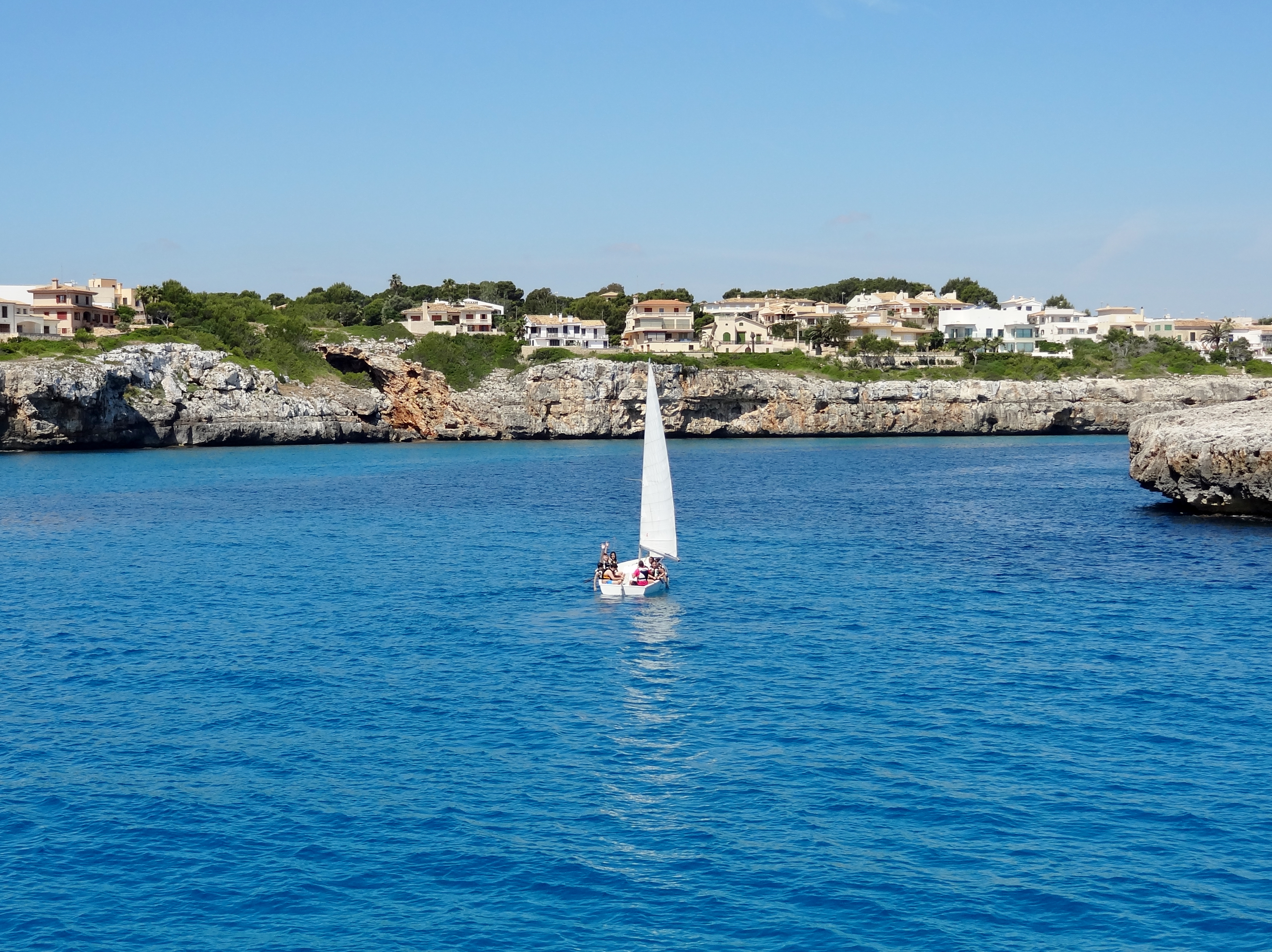 Eingang zur Cala Manacor, der Bucht von Porto Cristo in der Gemeinde Manacor, Mallorca, Spanien